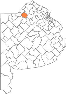 Germán Ramos.